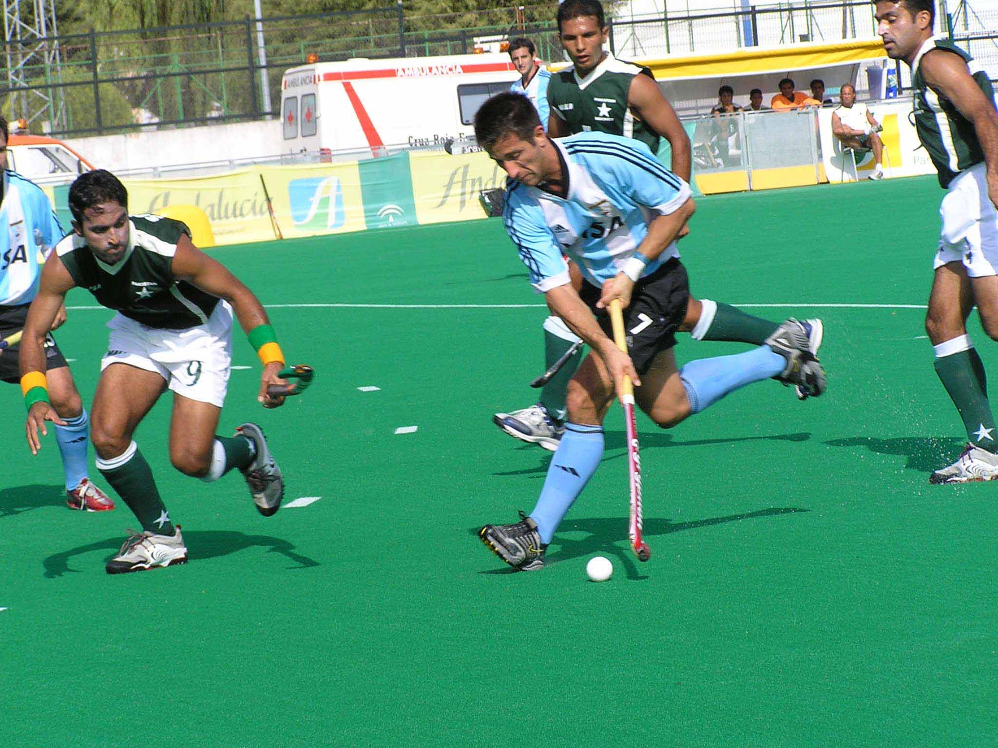 El jugador argentino lucha contra tres adversarios de la selección de Pakistán, en Alcalá la Real, Jaén, España.